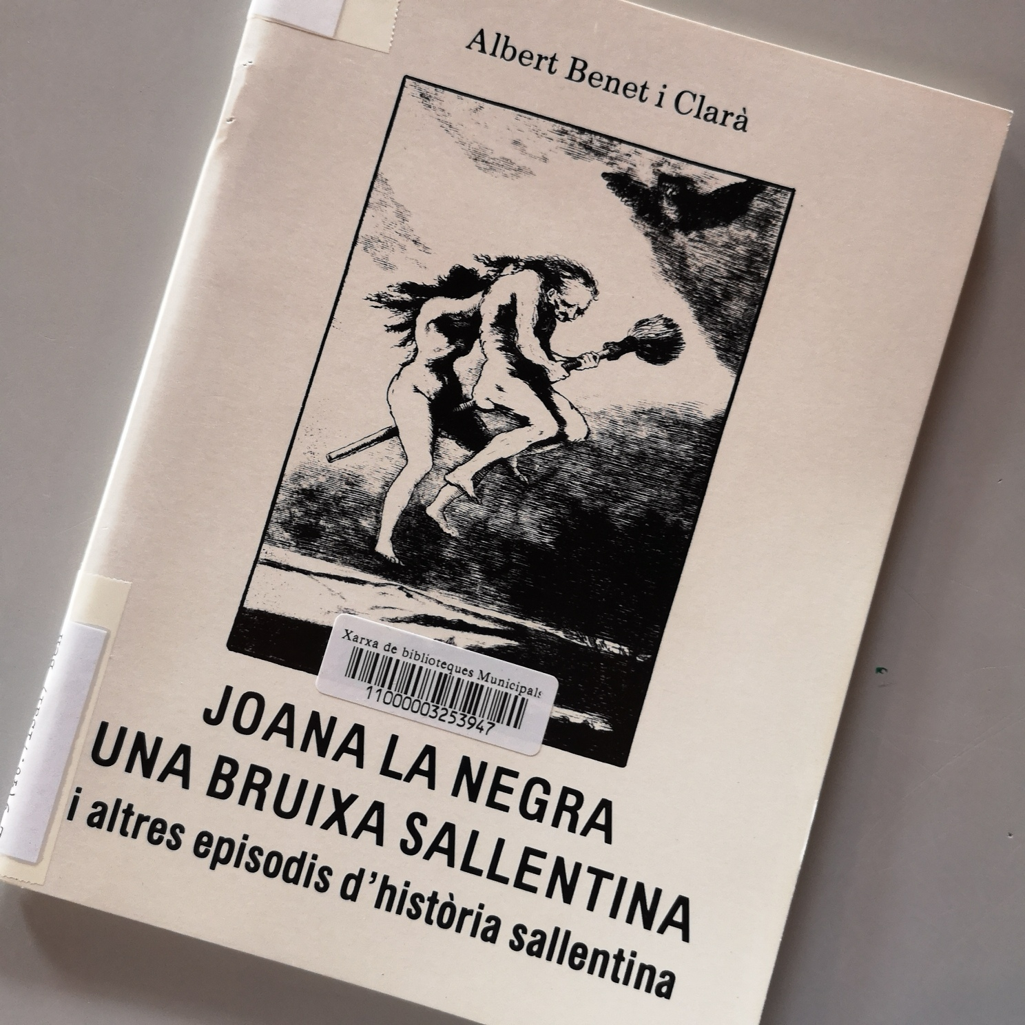 Llibre sobre Joana la Negra, dona de Sallent acusada de bruixeria, i altres fets històrics.